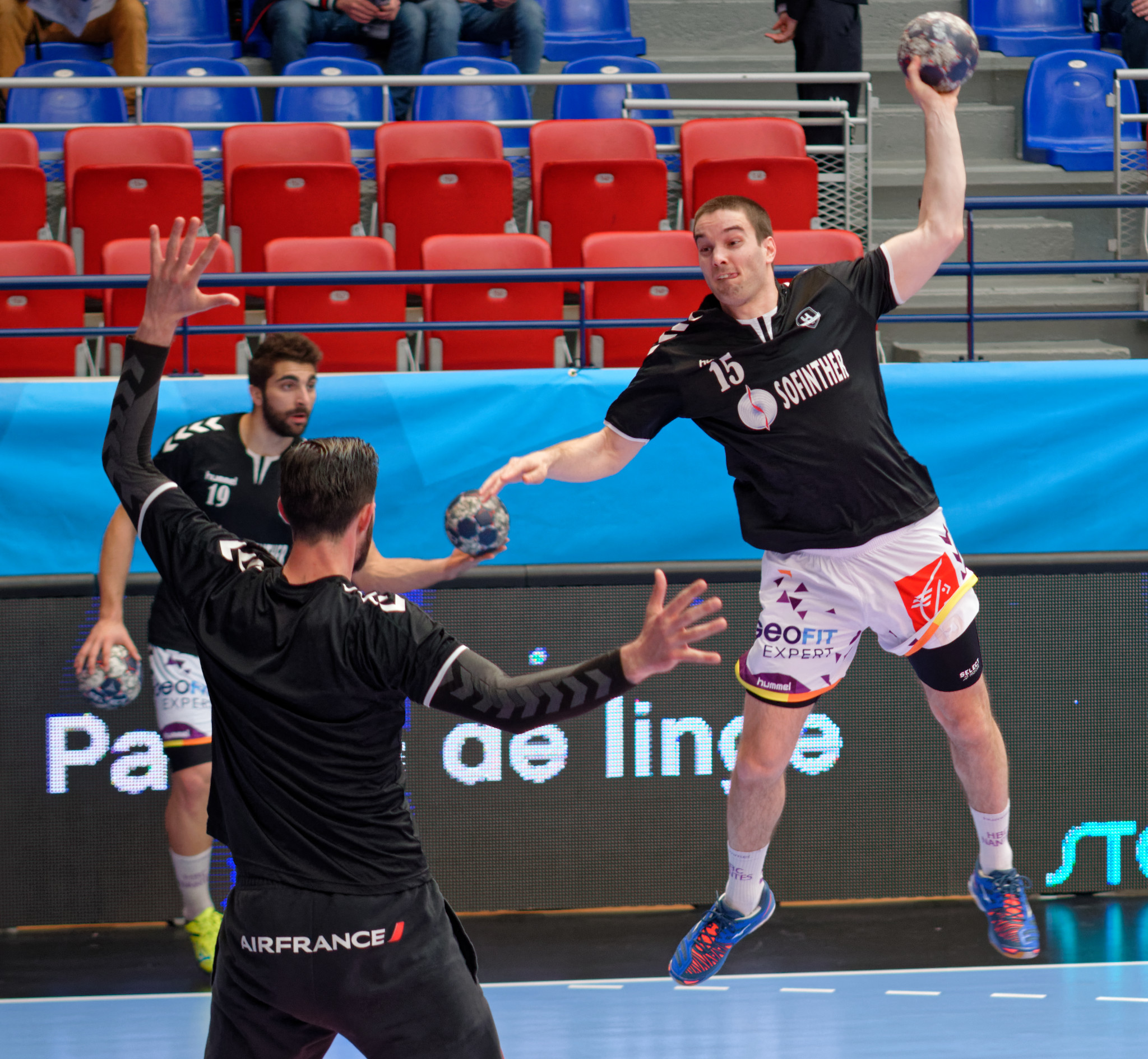 Huitième de finale de la ligue des champions 2016-17 entre le PSG et le HBC Nantes. A Coubertin, le 1er avril 2017.